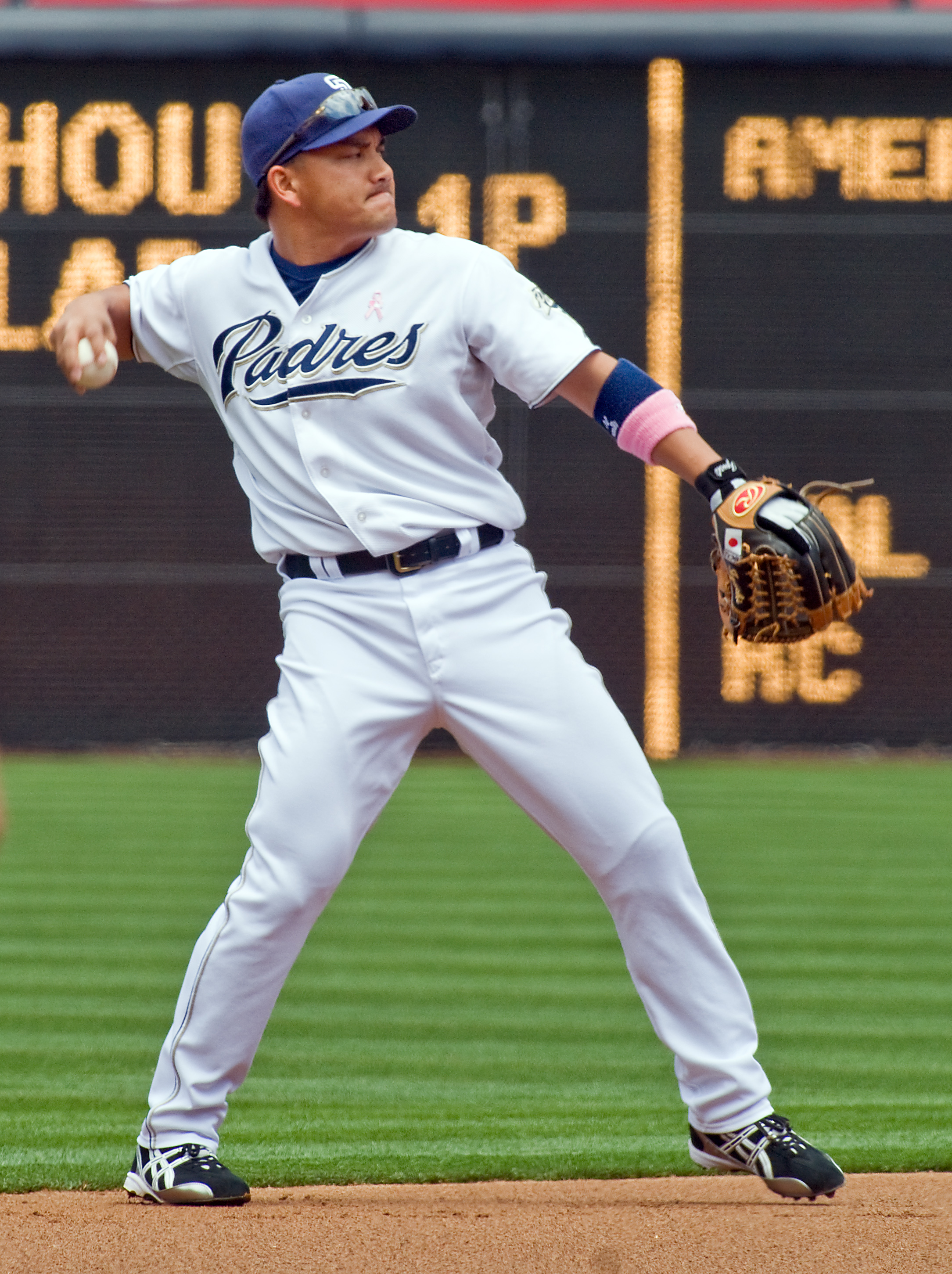 Tadahito Iguchi